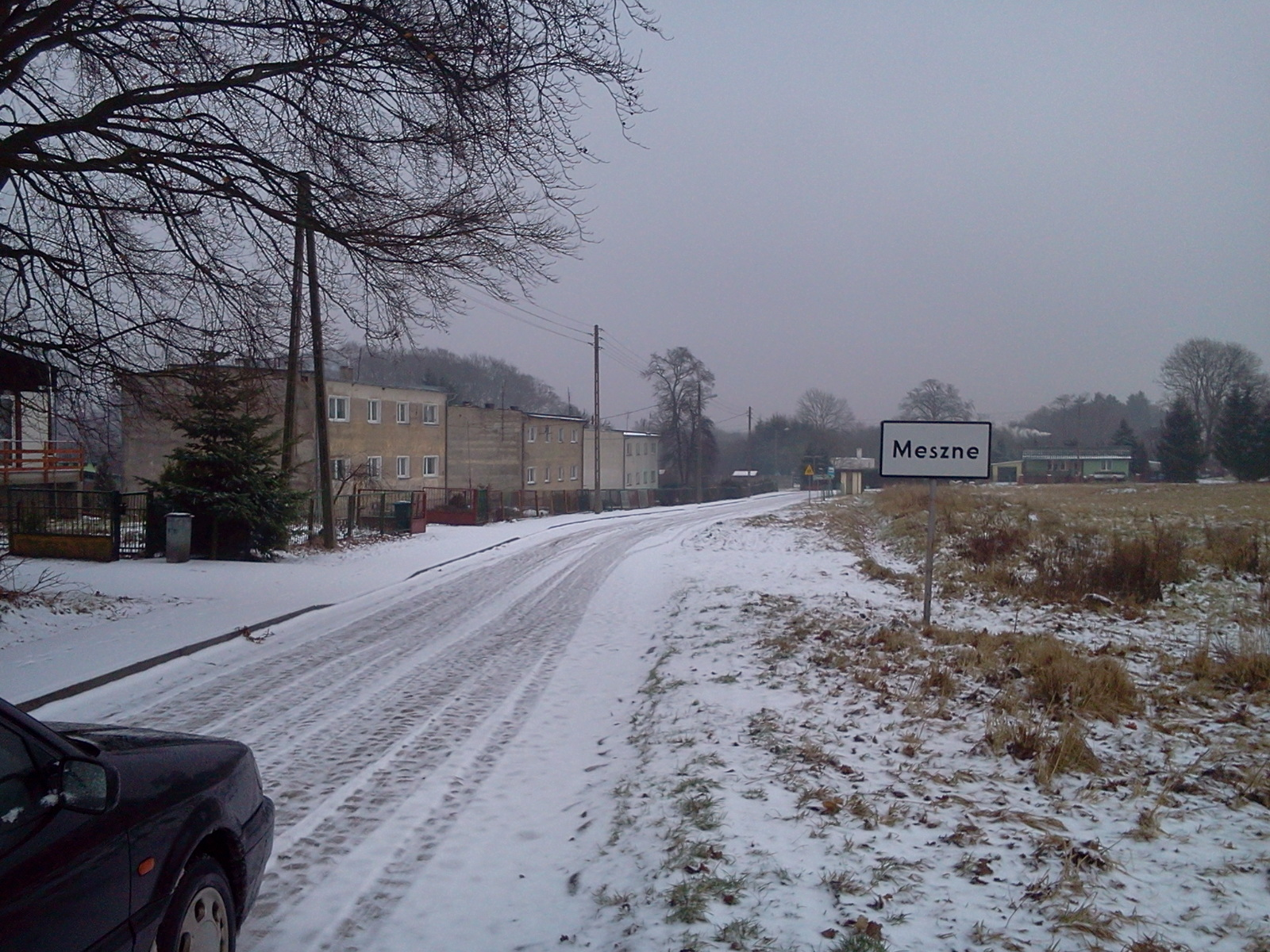 Meszne. Widok od strony drogi Strzmiele - Rekowo